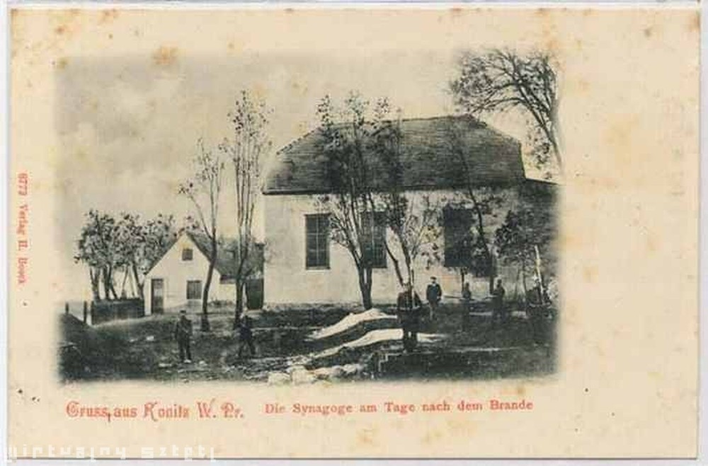 Ansichtskarte mit der Synagoge in Konitz (ab 1920 Chojnice